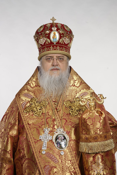 Епископ Нежинский и Прилукский Ириней (Семко)